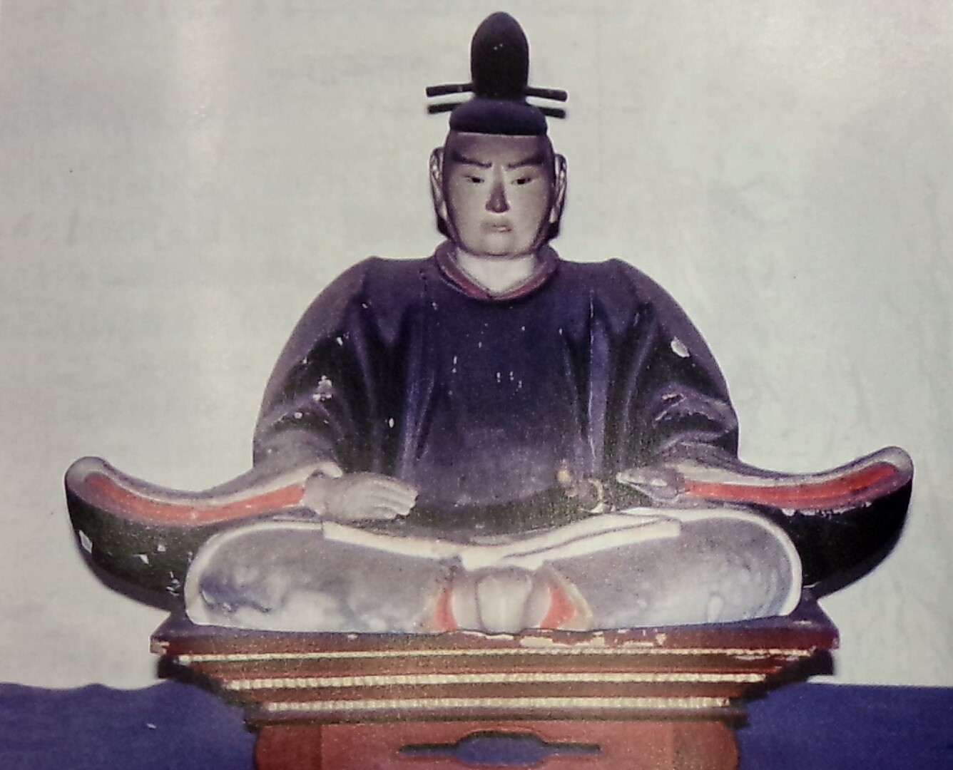 久世広之の木像。